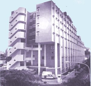 Vista de un lateral del nuevo edificio del Hospital Naval Central "Cirujano Mayor Dr. Pedro Mallo", en la ciudad de Buenos Aires. Arquitectos: Clorindo Testa, Héctor Lacarra y Juan Genoud. Año: 1970 (proyecto) - 1981 (inauguración) Dirección: Av. Patricias Argentinas 351